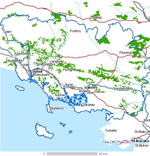 Carte du département Morbihan Légende